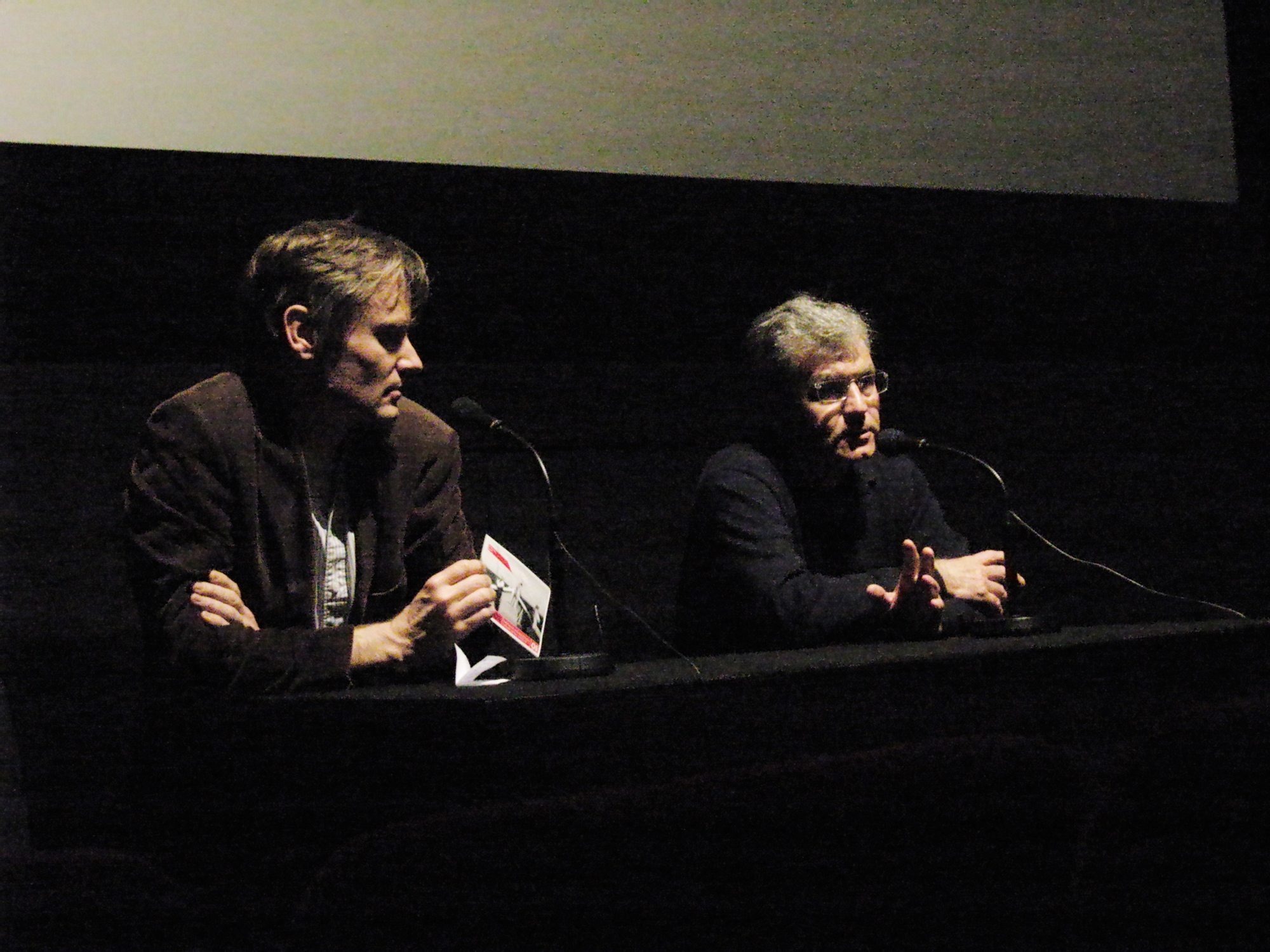 Ulrich Mannes im Gespräch mit Peter Goedel nach der Vorstellung von „Hinter den Elbbrücken“ im Münchner Filmmuseum.